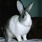 una foto de mi conejo